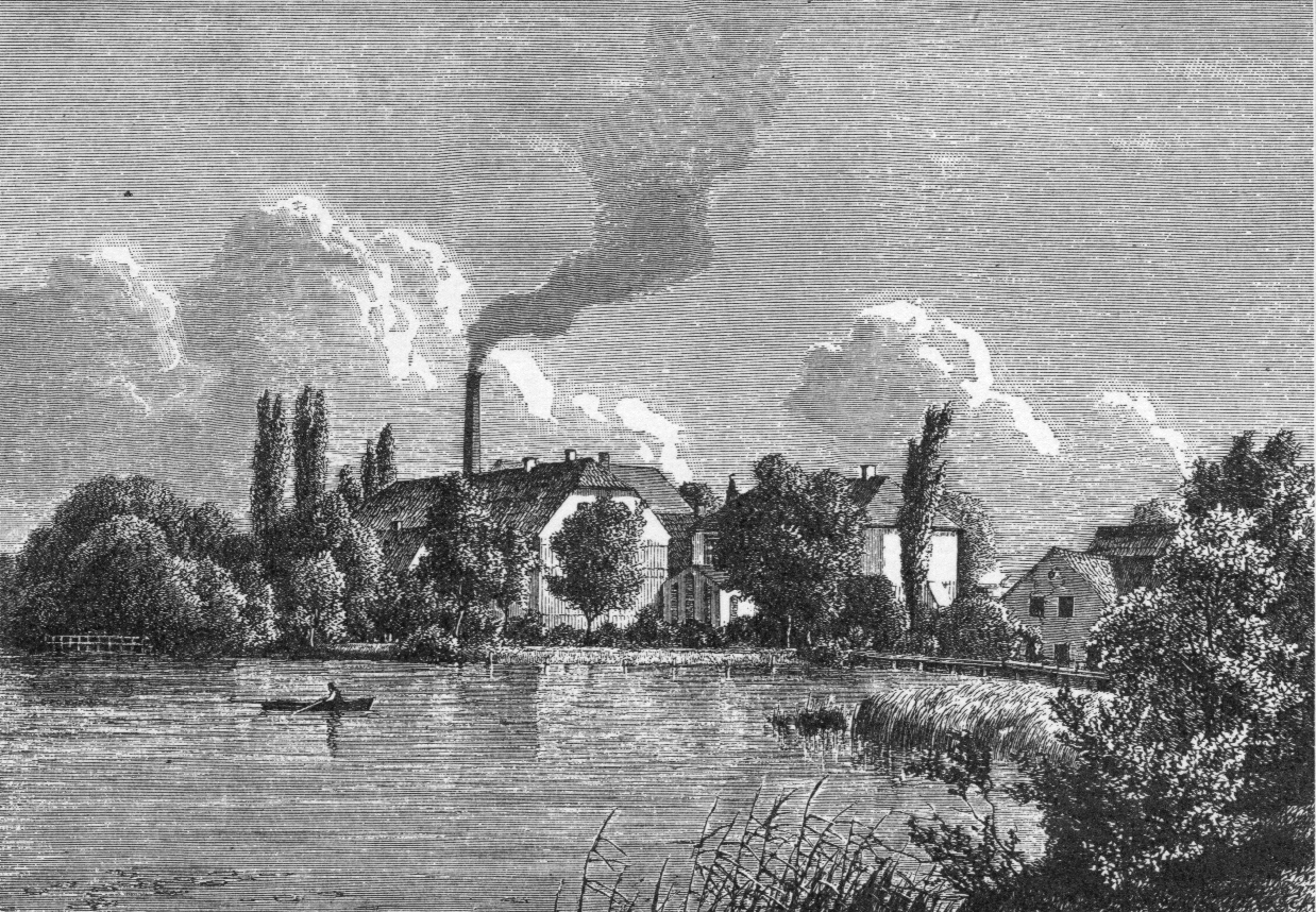 Strandmøllen er et historisk industrianlæg med Mølleåens udløb i Øresund i Nordsjælland. Træsnit fra 1868